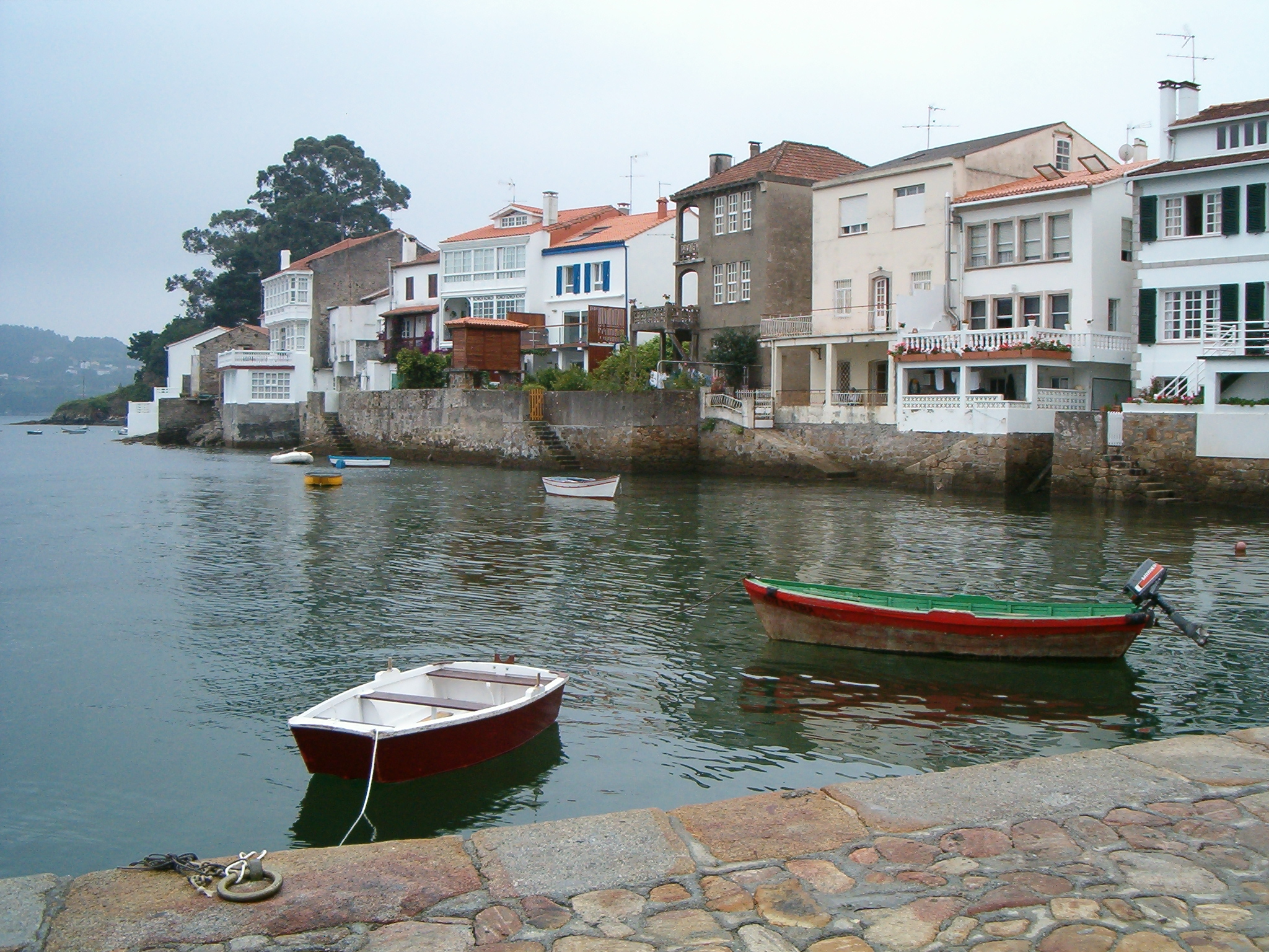 Foto del puerto de Redes